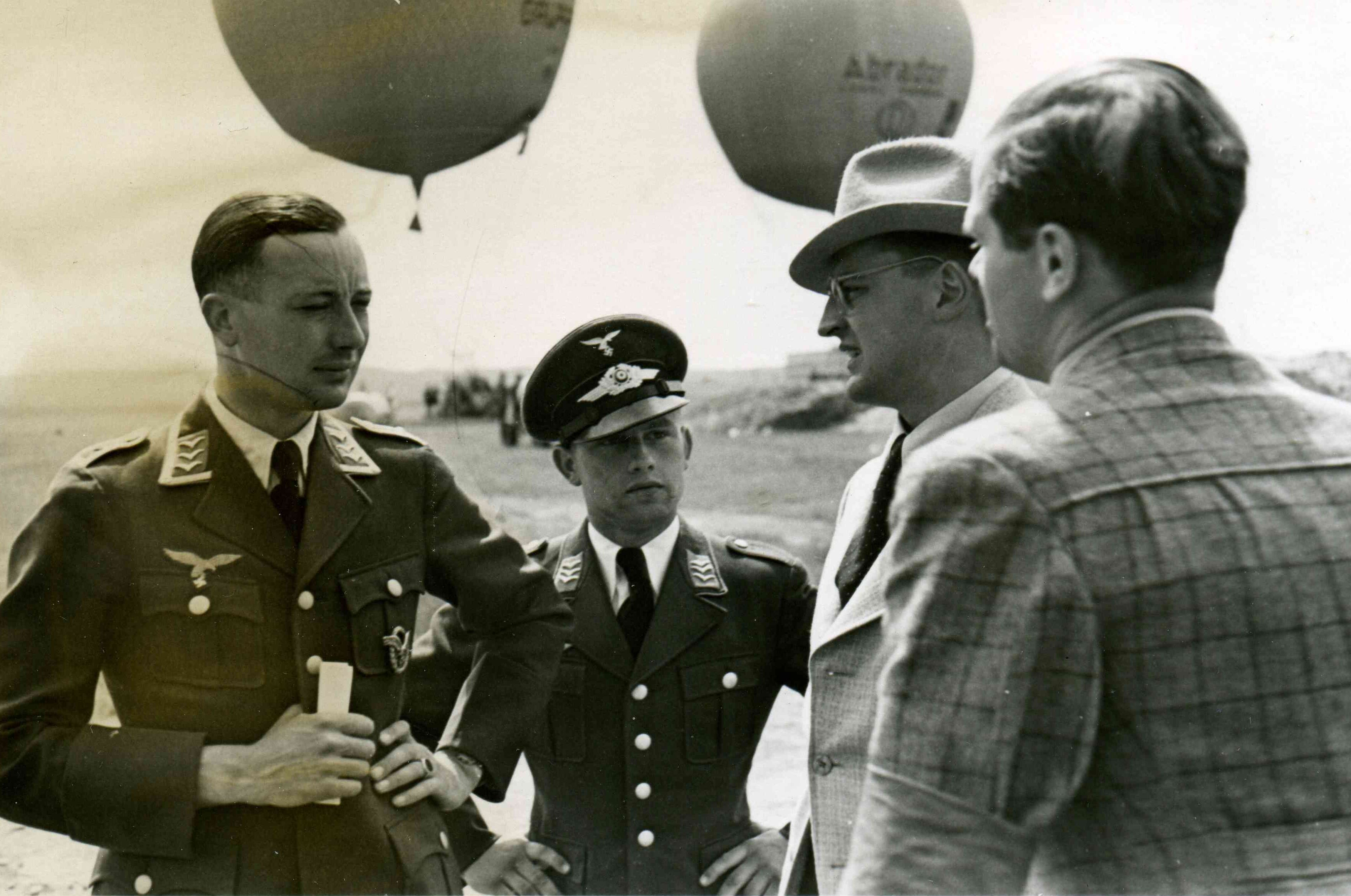 Foto anlässlich eines Großflugtages in Kassel-Waldau am 17. Juli 1938, der vom Fieseler Flugzeugbau Kassel maßgebend gestaltet wurde. Teilnehmer: Von links Falderbaum, ein FW vom Fliegerhorst Kassel-Rothwesten, die Fieseler Mitarbeiter Dipl.-Ing. Fiedler und Flugkapitän Knoetsch